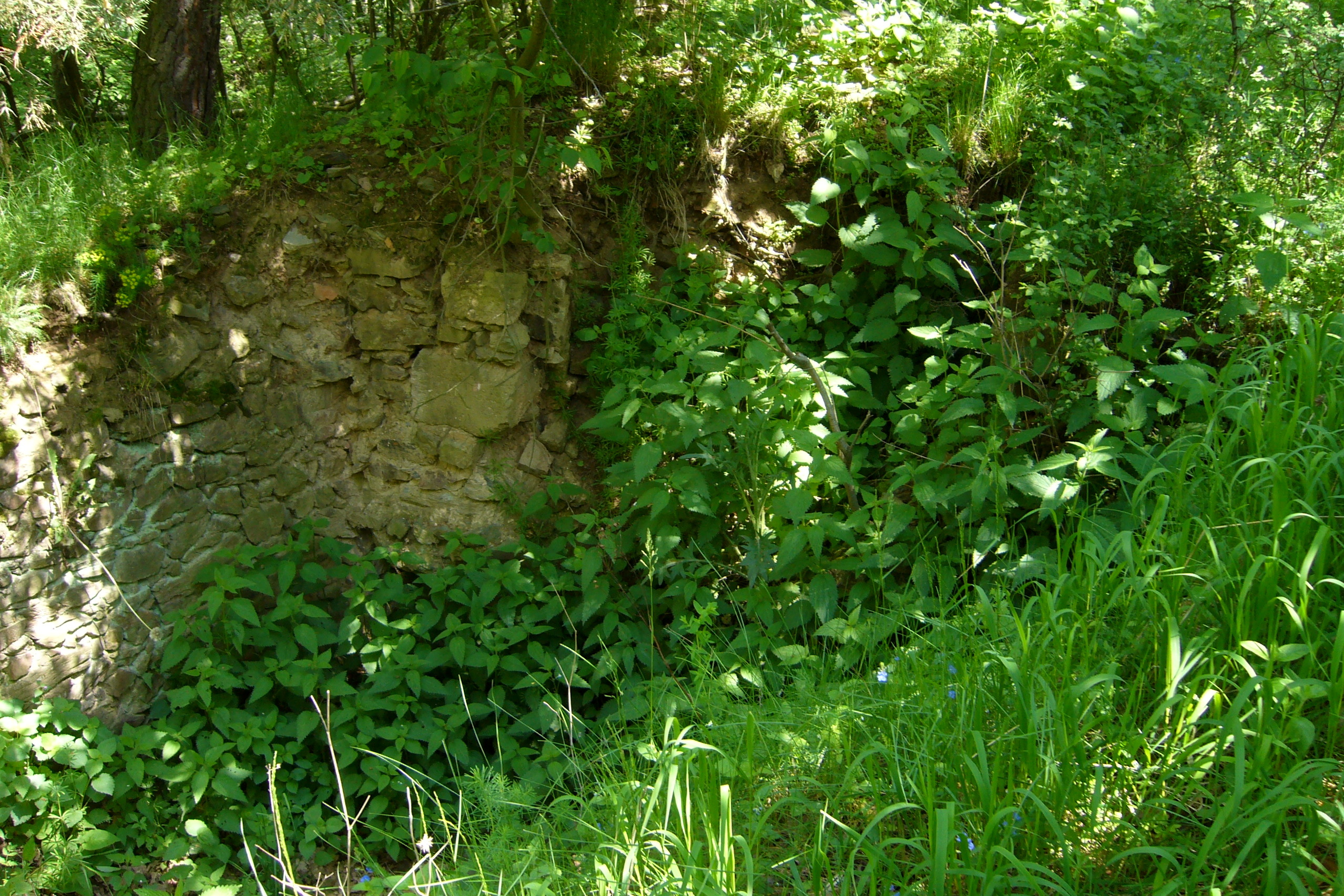 Odkryté zdivo, Podmokly (Úněšov).